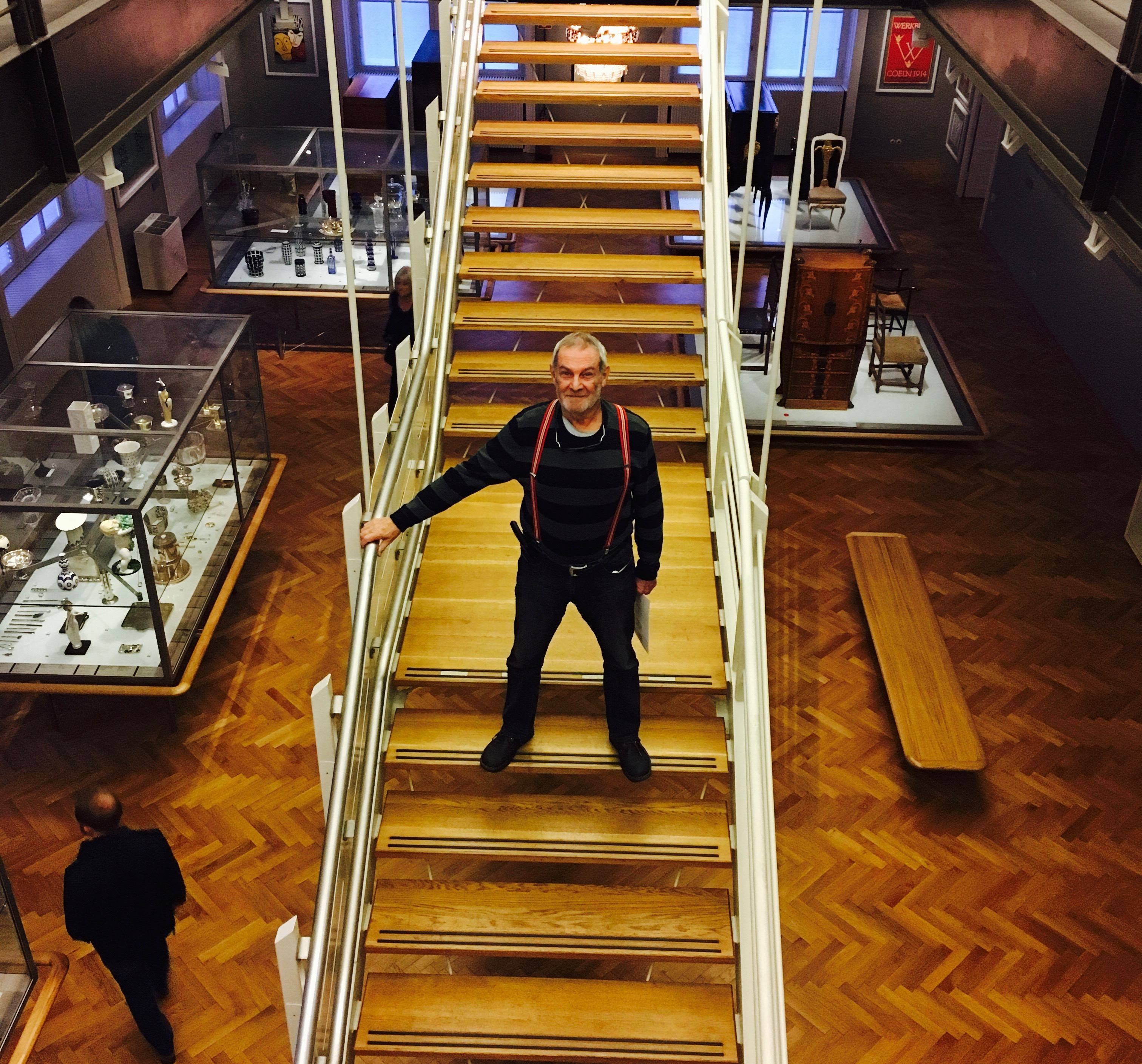 Museum Angewandte Kunst vo Viedni počas návštevy Jana Meisnera